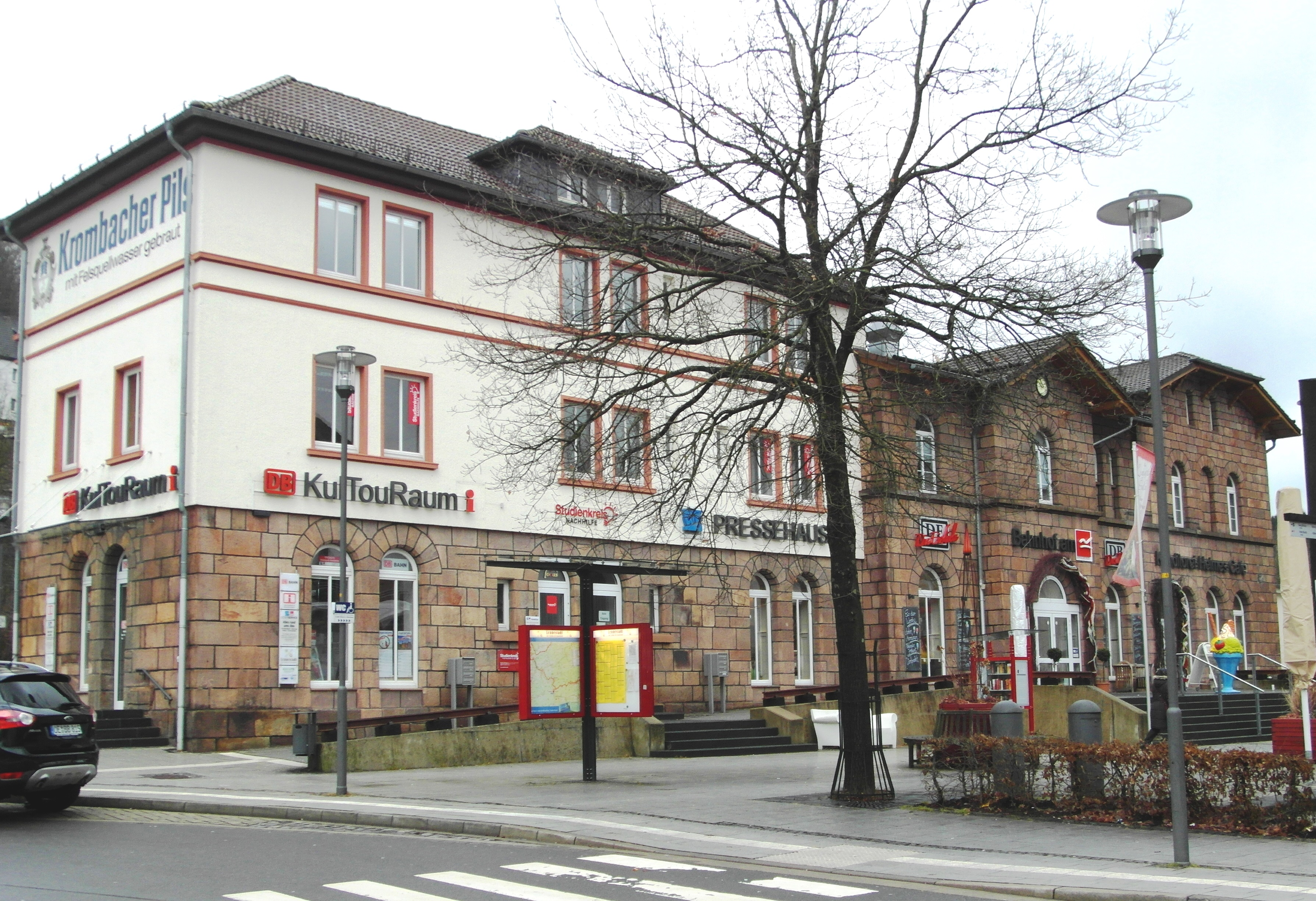 Renovierter Bahnhof in Altenhundem. Im Jahr 2012 als Wanderbahnhof ausgezeichnet und im Jahr 2013 als "kundenfreundlicher Bahnhof"